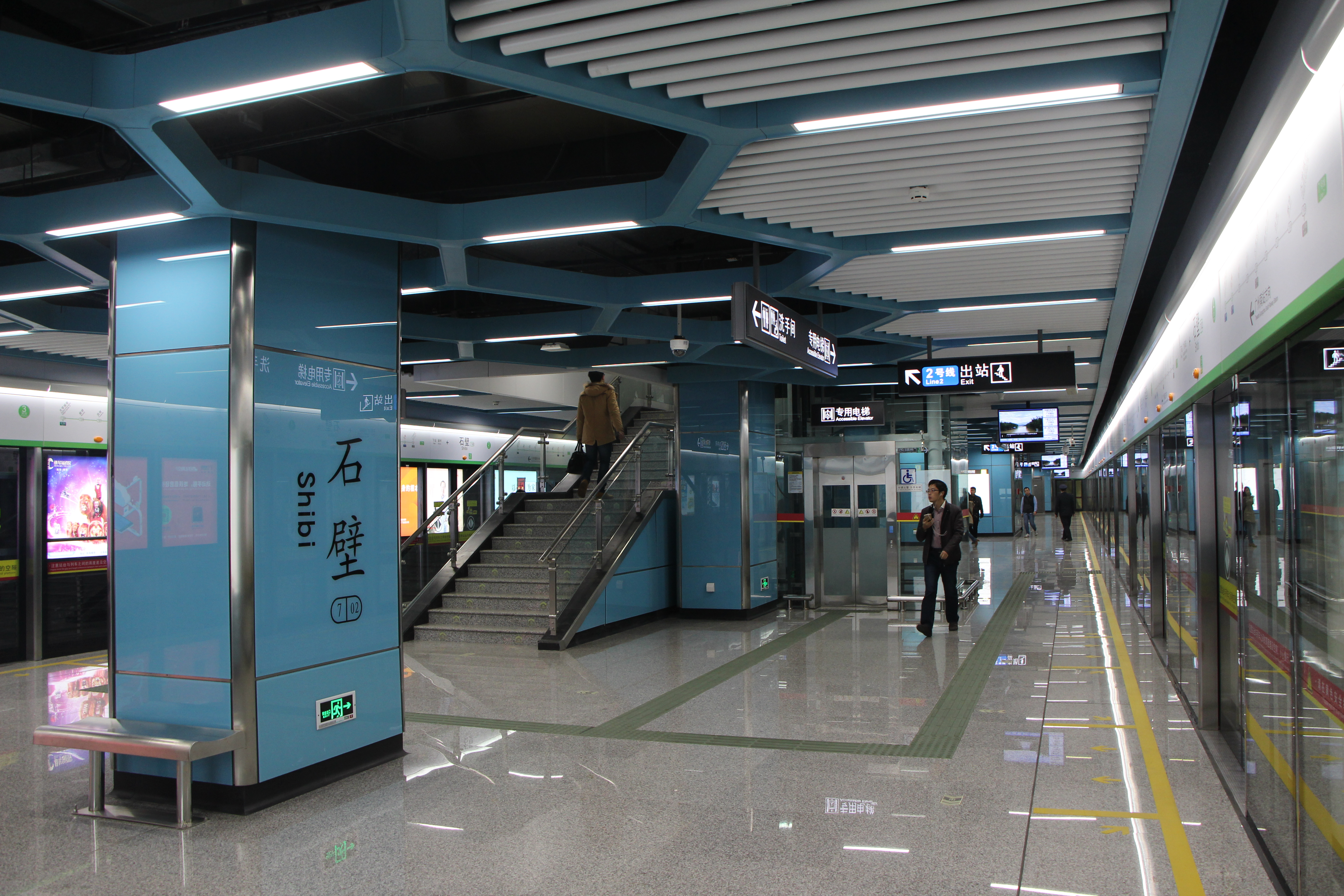 广州地铁石壁站